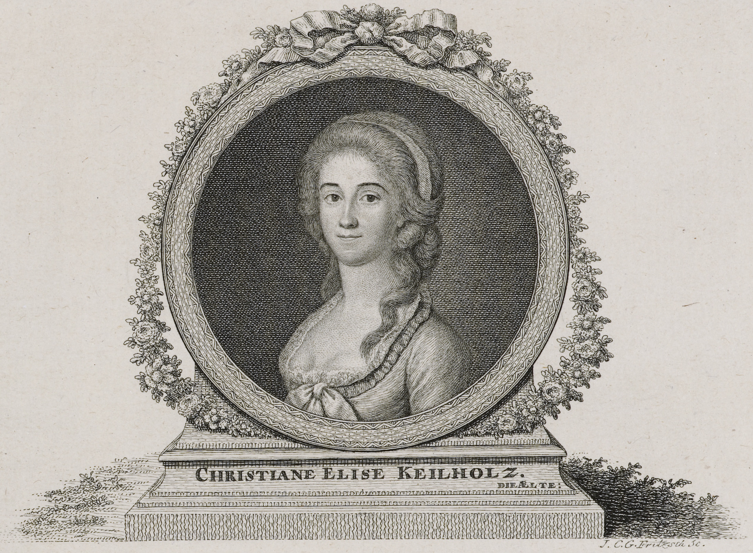 Christiane Elise Keilholz